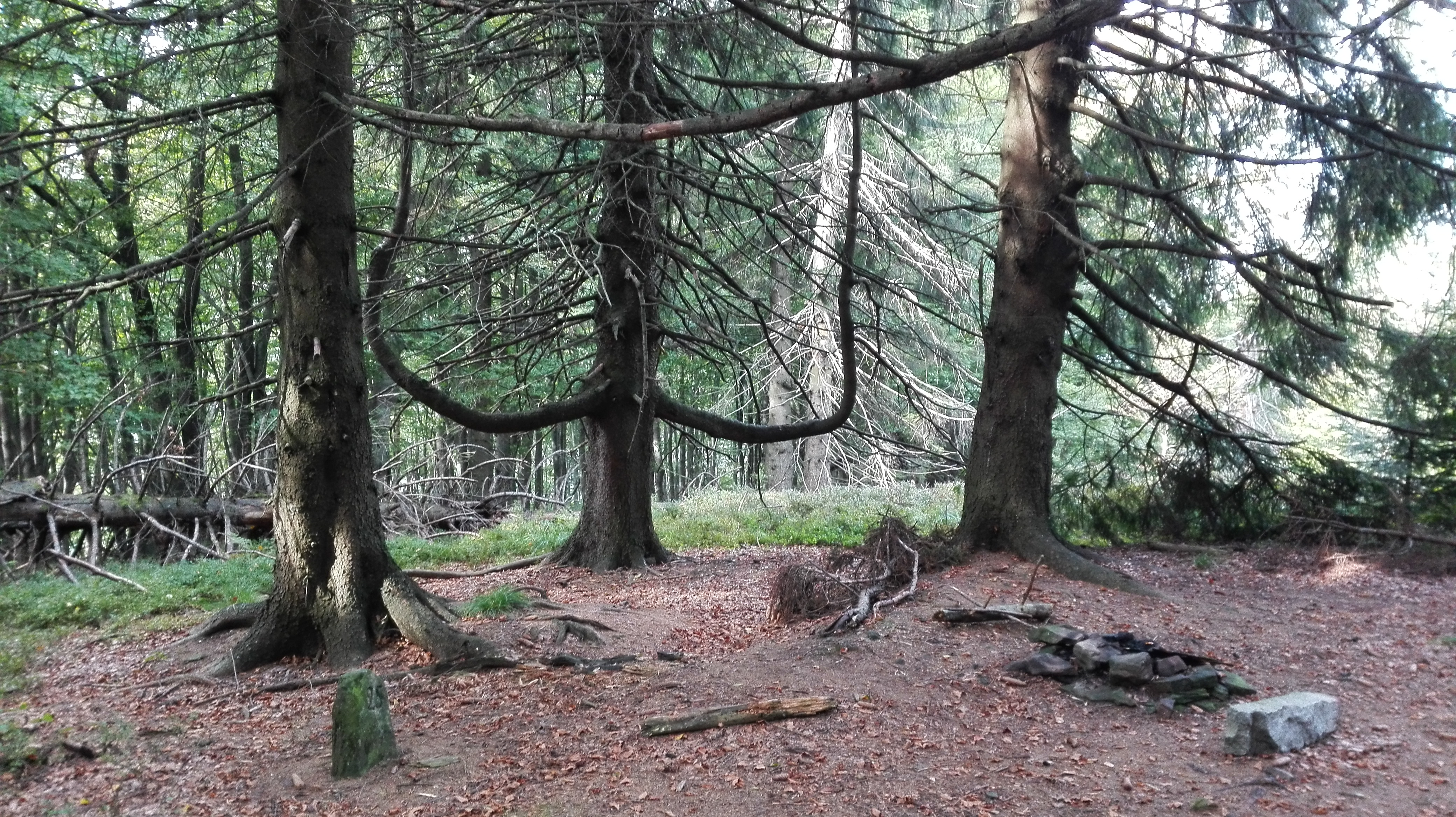 Vrchol hory Lipí (902 m)